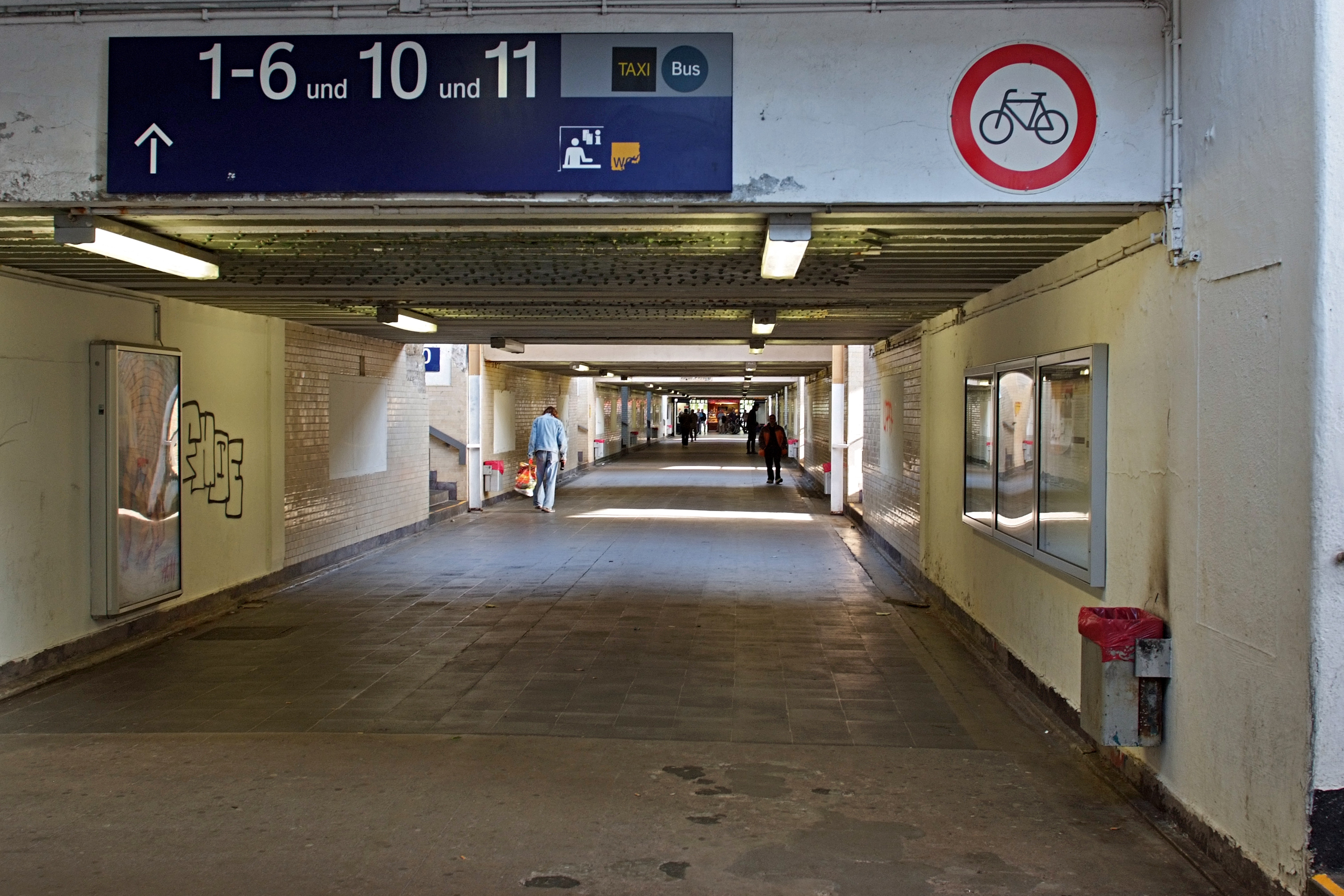 Bahnhofsunterführung Frankfurt-Höchst